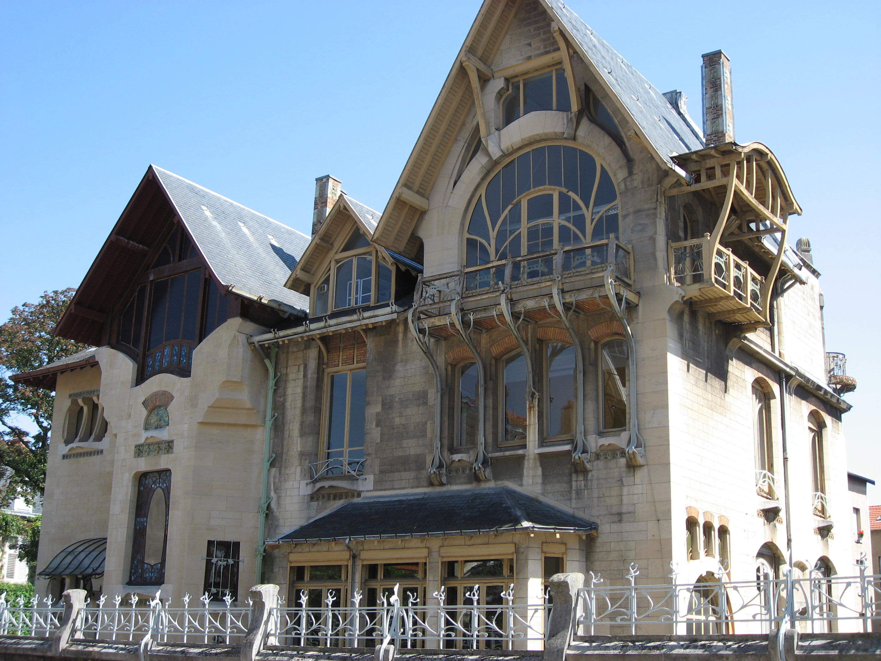 Villa Jika pour Louis Majorelle 1901-1902 1, rue Louis Majorelle 54000 Nancy Architecte: Henri Sauvage Vitraux: Jacques Grüber Ferronneries: Louis Majorelle Grès flammés: Alexandre Bigot Map: 48° 41' 8" N 6° 9' 50" E